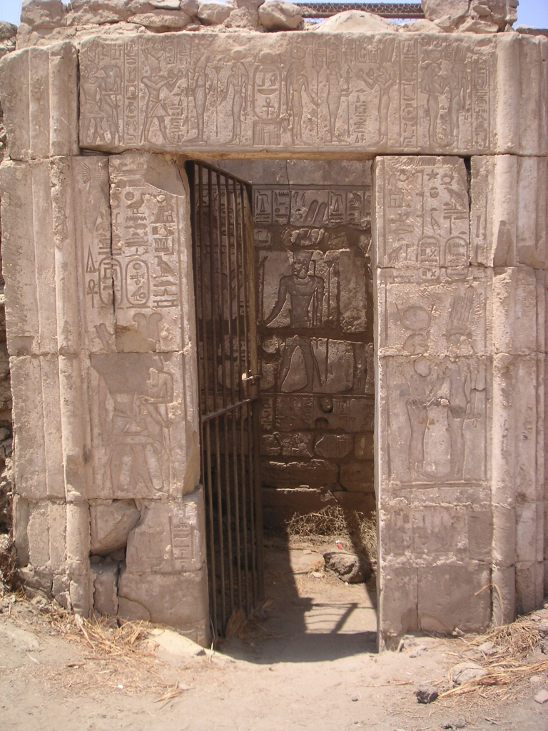 Chapelle de Taharka et des divines adoratrice Chépénoupet II et Aménirdis II - XXVe dynastie égyptienne - Karnak